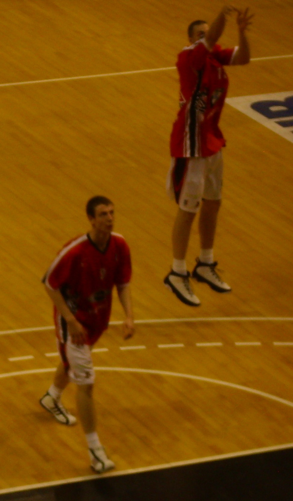 Nicolas Lang et Joffrey Lauvergne à l'échauffement avant un match de l'Elan Chalon contre Le Mans en 2011